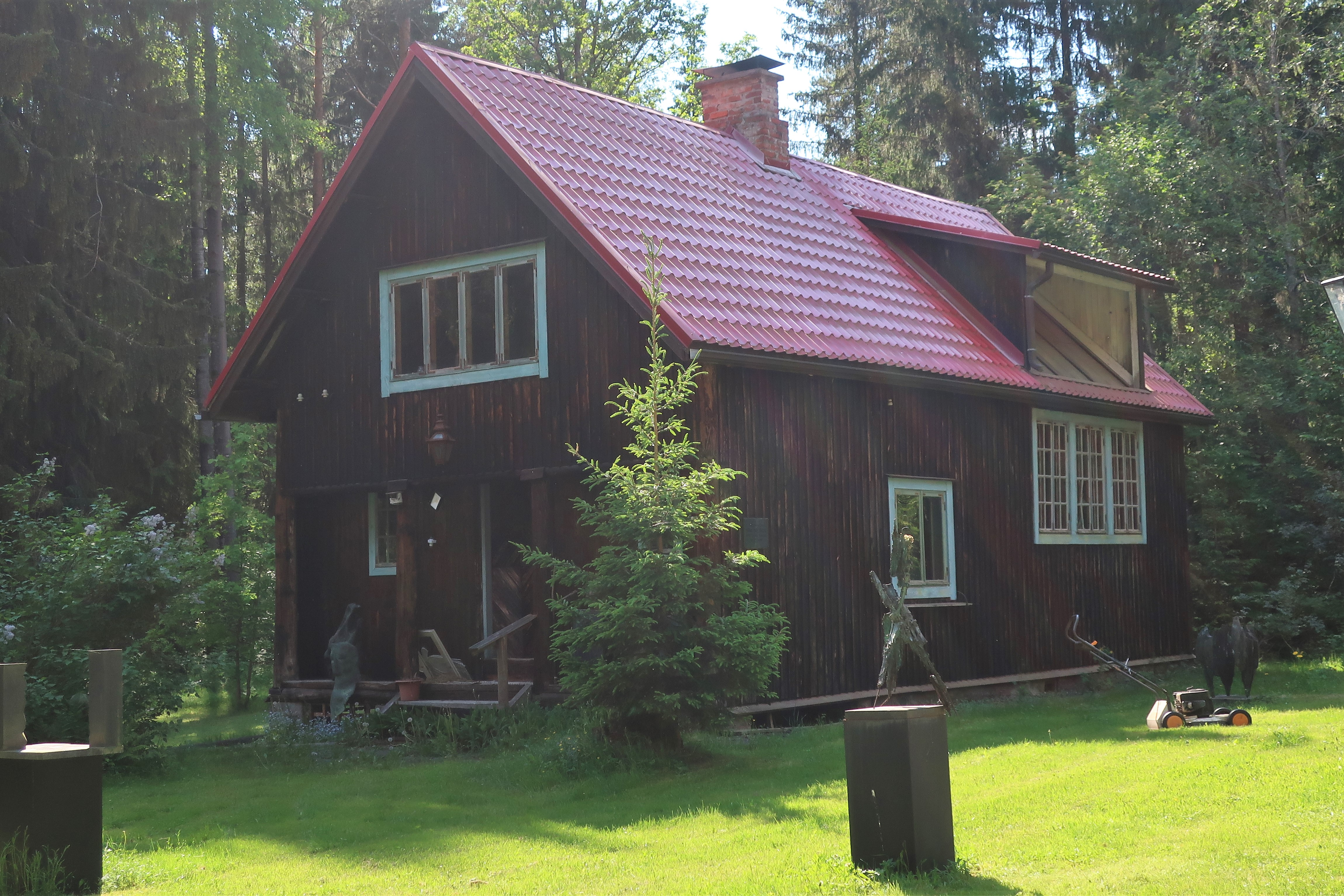 talvella 1915 valmistunut huvila, jossa on ateljeetilat, kansallisromanttisia piirteitä